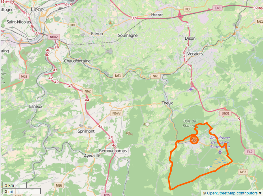 Situation de la ville de Spa en Belgique, OSM. This map may be incomplete, and may contain errors. Don't rely solely on it for navigation.